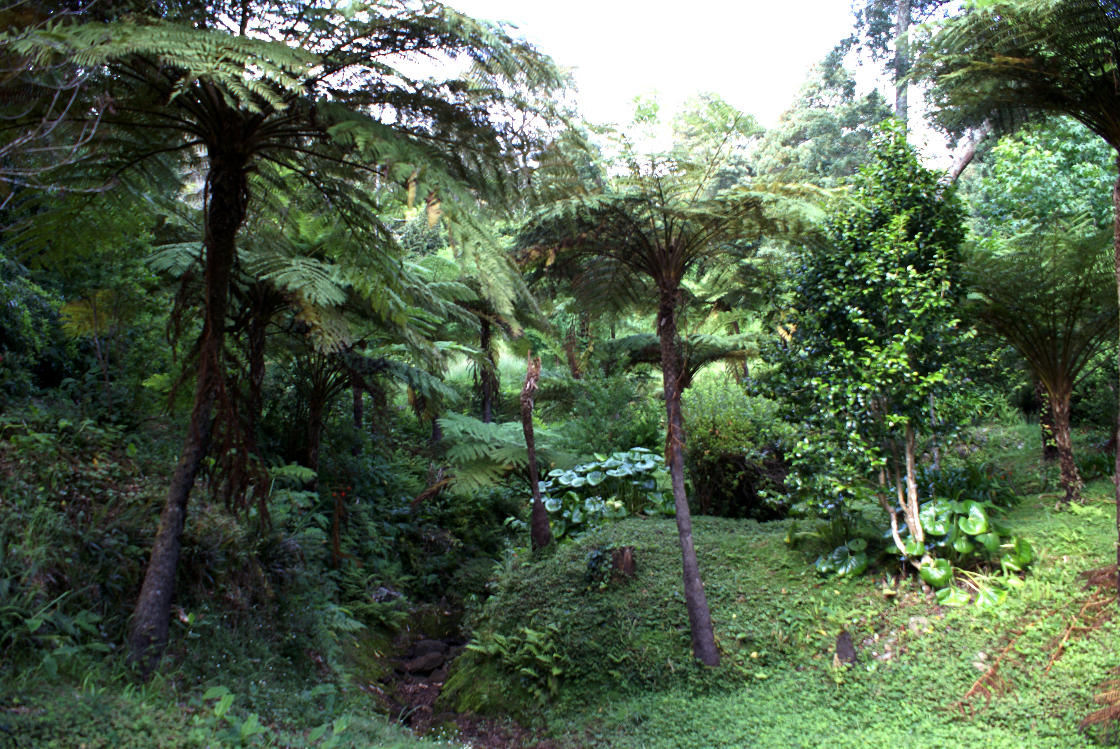 Parque Florestal da Silveira, vegetação, Ribeira Seca, Calheta, ilha de São Jorge, Açores